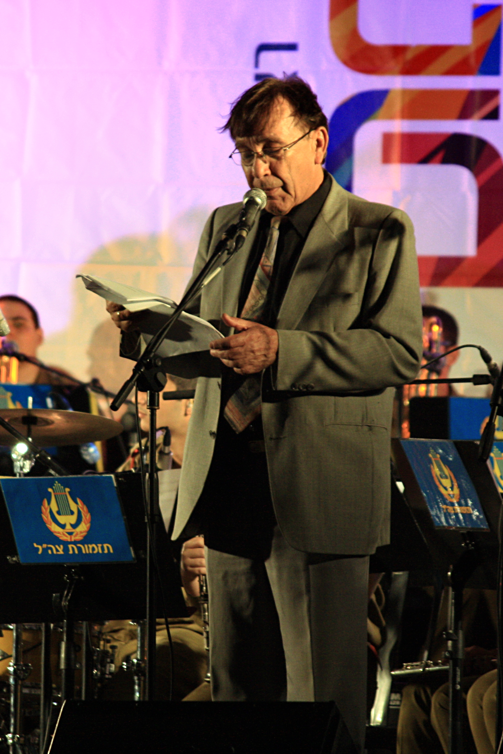 מנחם פרי, ספטמבר 2013.